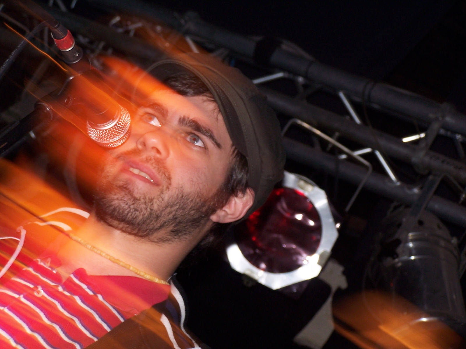 Tomas Kalnoky auf einem Konzert seiner Band Streetlight Manifesto am 22.10.2005 in Köln.